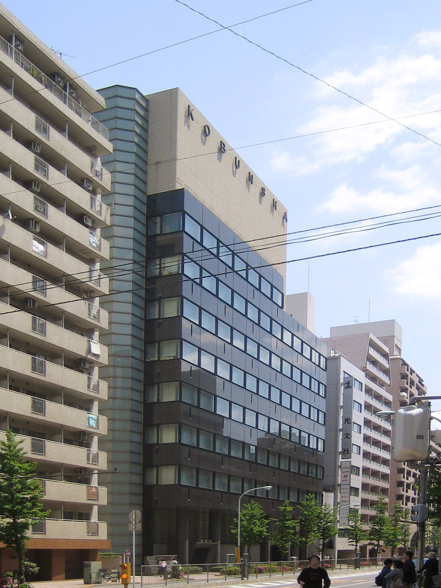 Kobunsha (光文社 Kōbunsha), in Bunkyo, Tokyo, Japan